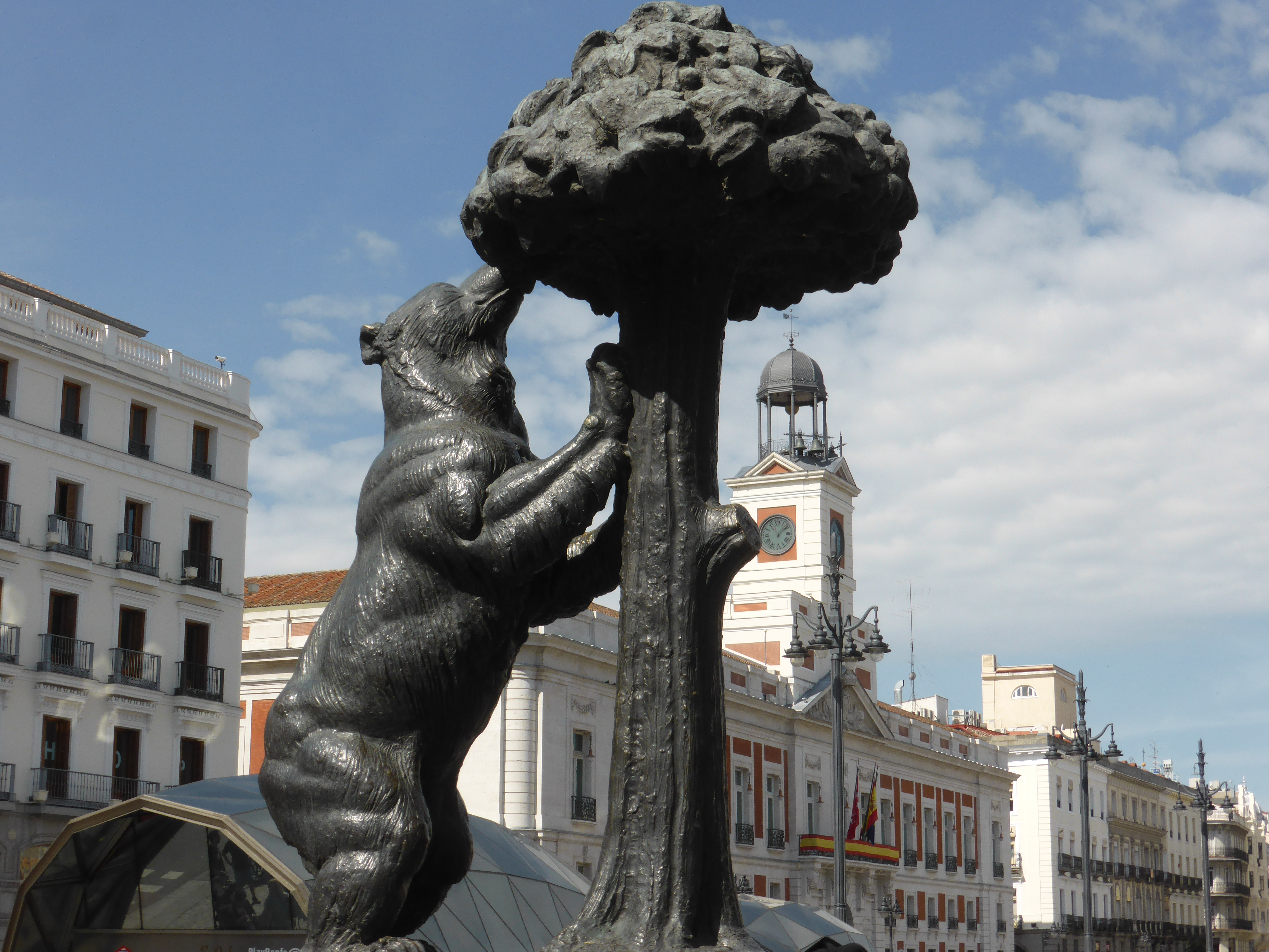 La escultura del Oso y el Madroño es del año 1967. Lleva poco más de 50 años en la plaza conocida como Puerta del Sol. Al fondo se divisa la "Real Casa de Correos", hoy sede de la Presidencia de la Comunidad de Madrid.